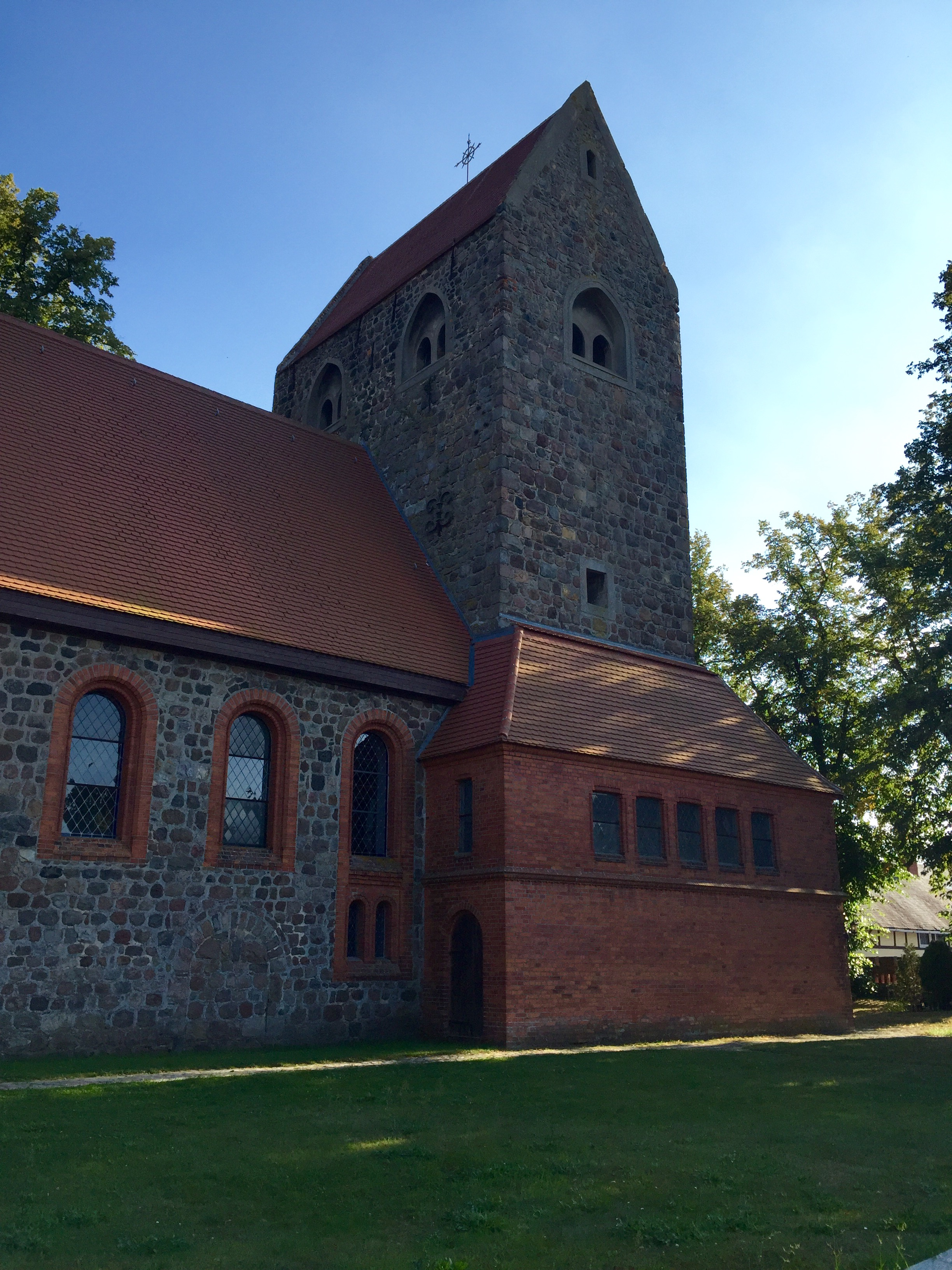 Kirche in Iden 2016